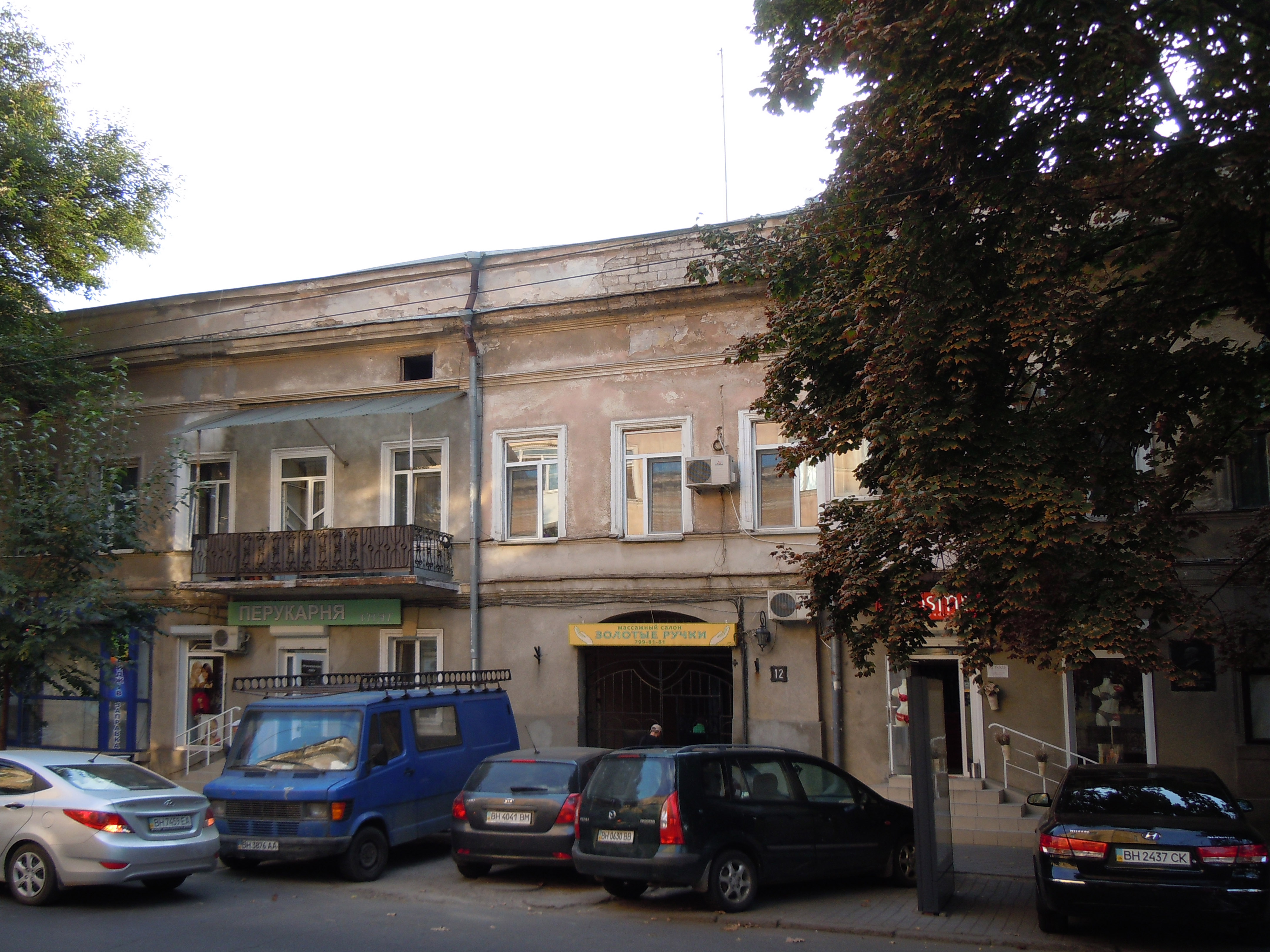 Будинок, у якому жив К.К. Пігров - хормейстер, заслужений діяч мистецтв УРСР, професор, Одеса, Соборна пл., 12